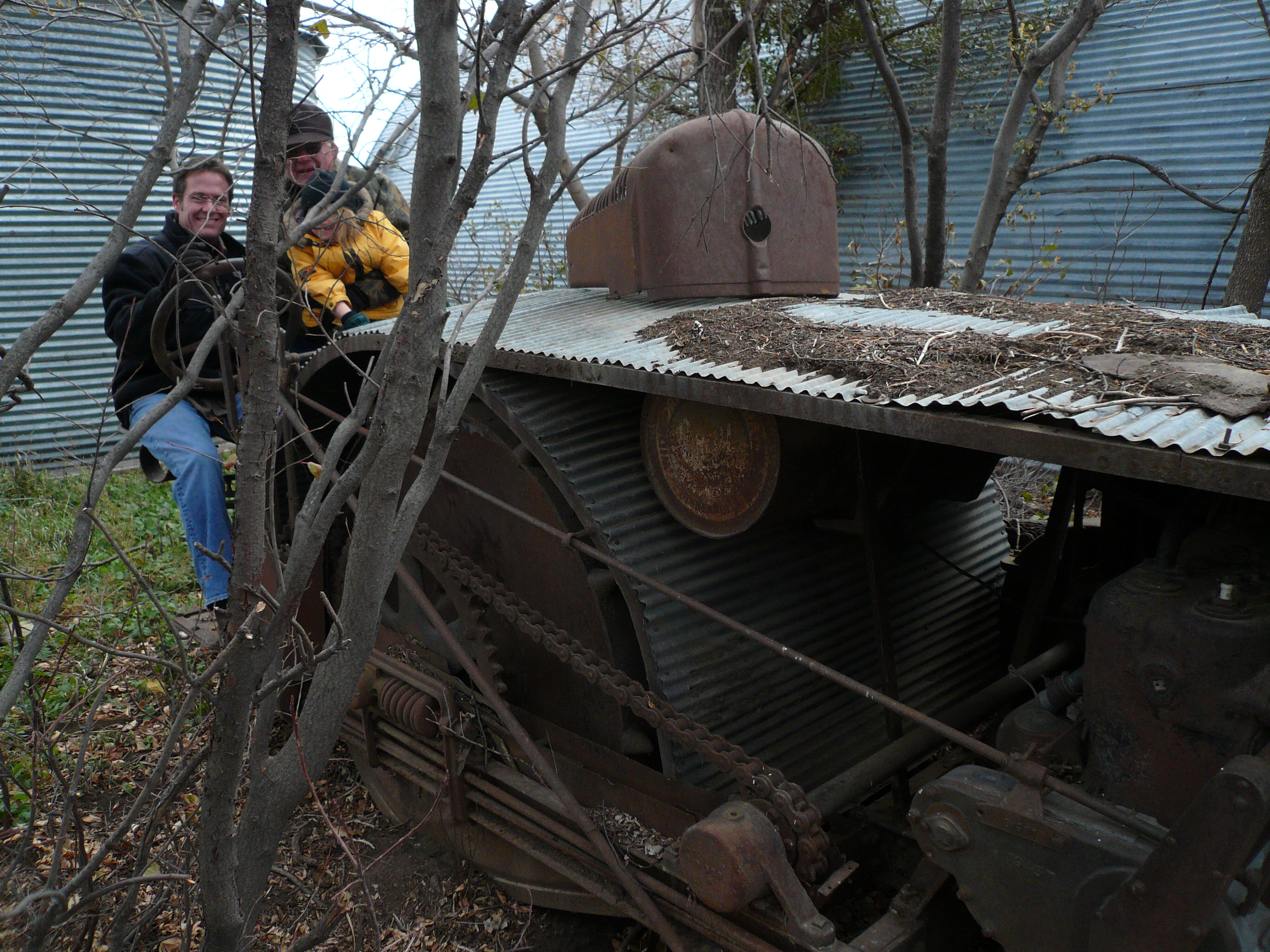 Gray Traktor.